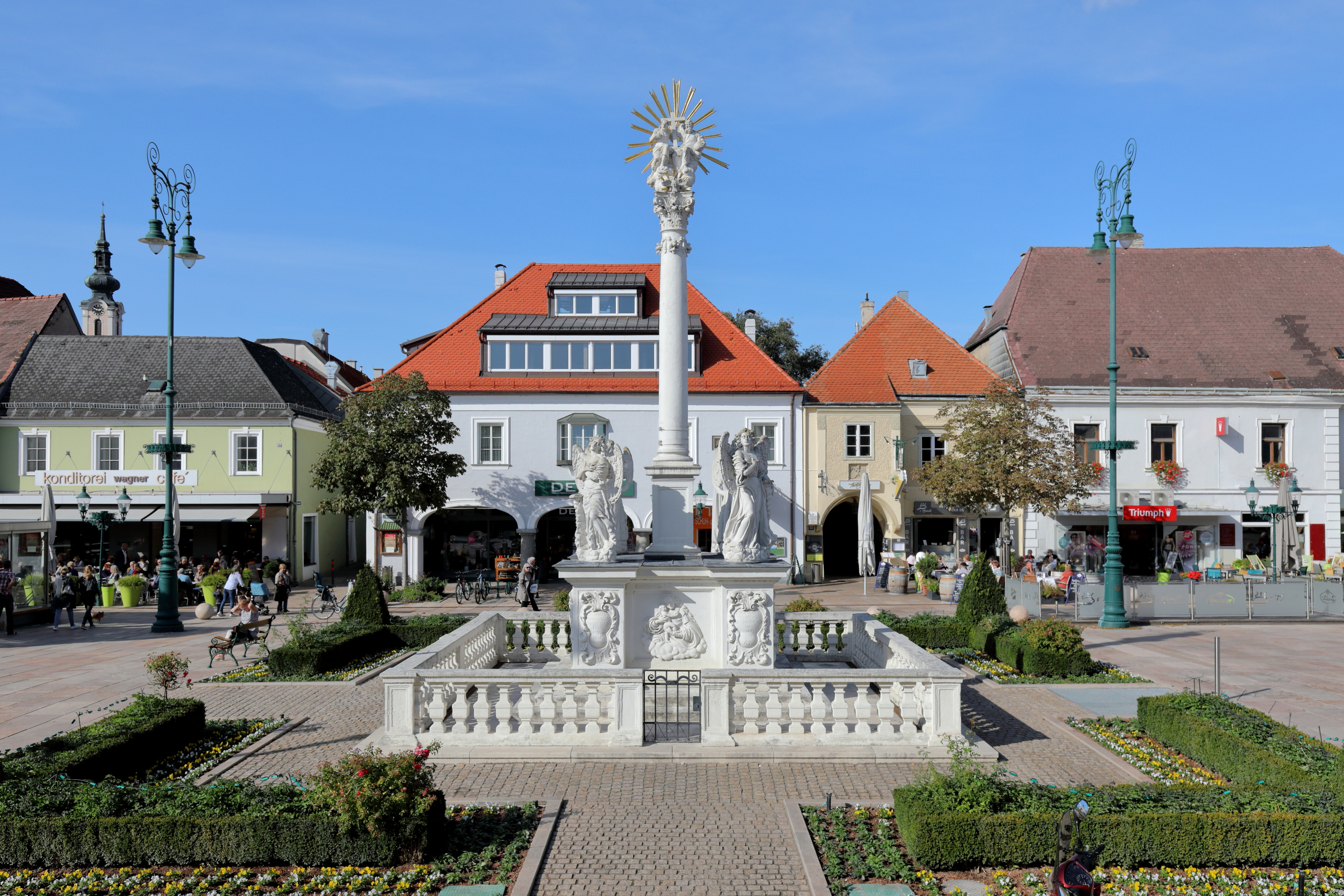 Die Dreifaltigkeits- bzw. Pestsäule am Hauptplatz der niederösterreichische Stadtgemeinde Tulln an der Donau. Die Säule wurde Ende des 17. Jahrhunderts von den Steinmetzmeistern Paul Stricker und Wolfgang Steinböck errichtet.